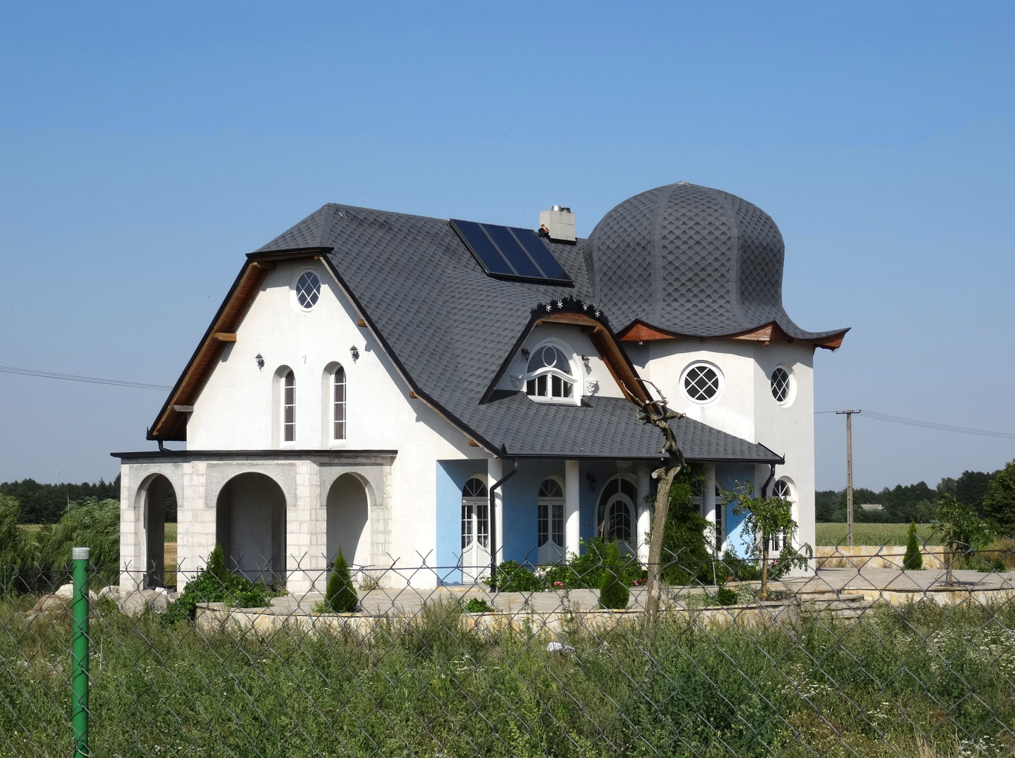 Gzin Dolny, gmina Dąbrowa Chełmińska